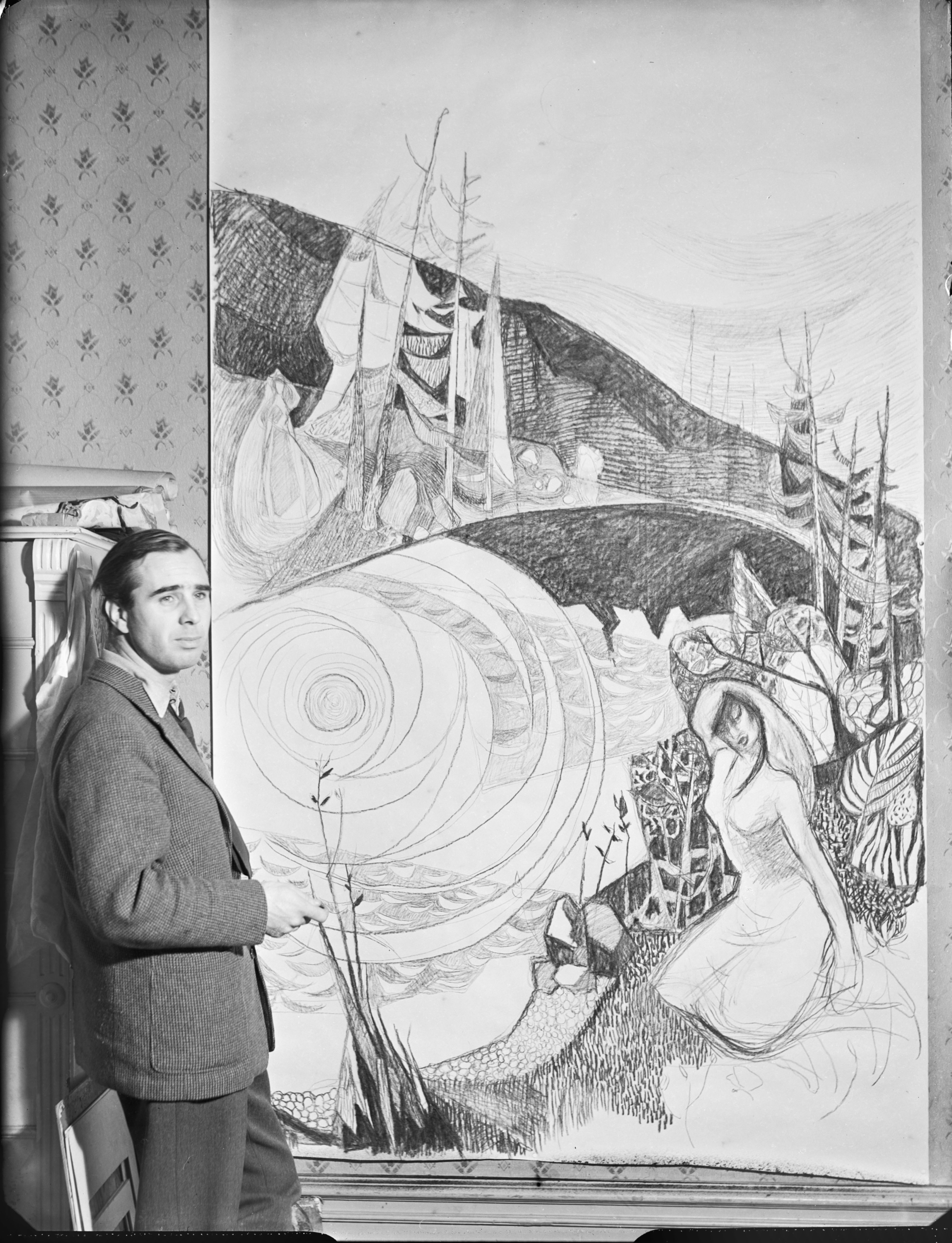 Porträtt av konstnären Armand Rossander bredvid en av hans tavlor.